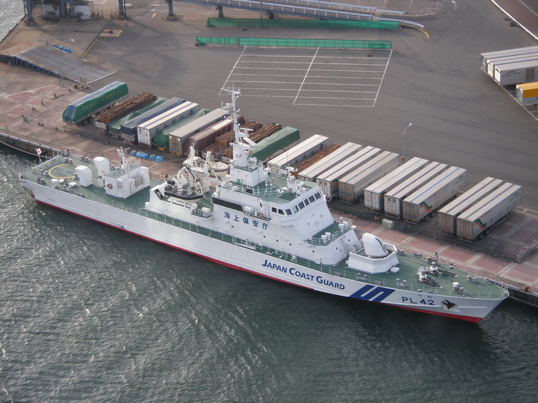 巡視船「でわ」、秋田港にて。ポートタワーセリオンから見下ろしたところ